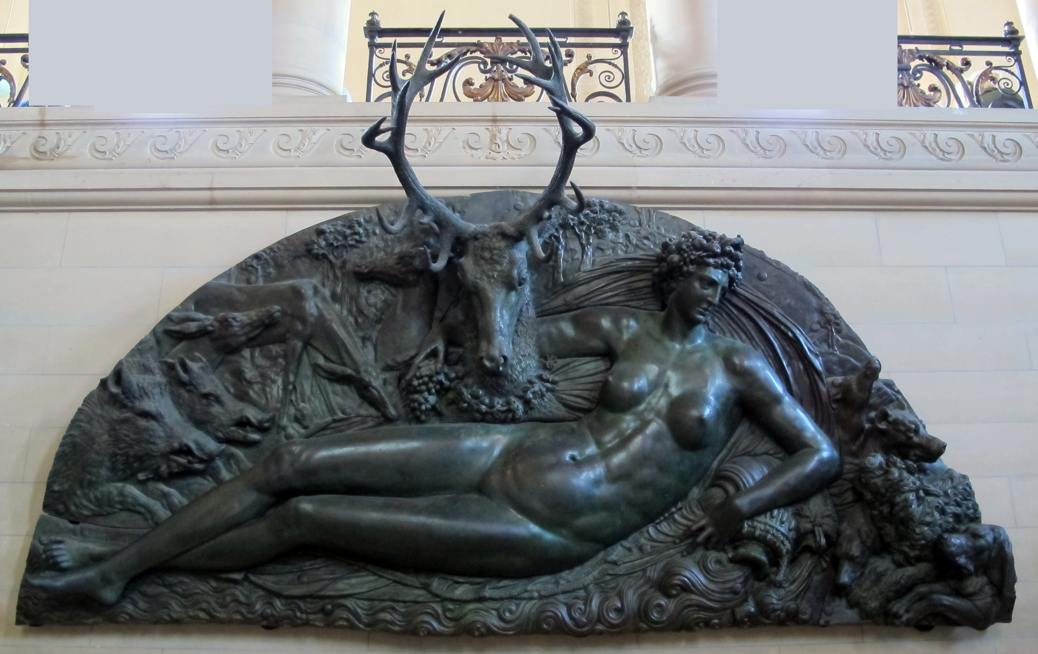 scultura italiana al Louvre